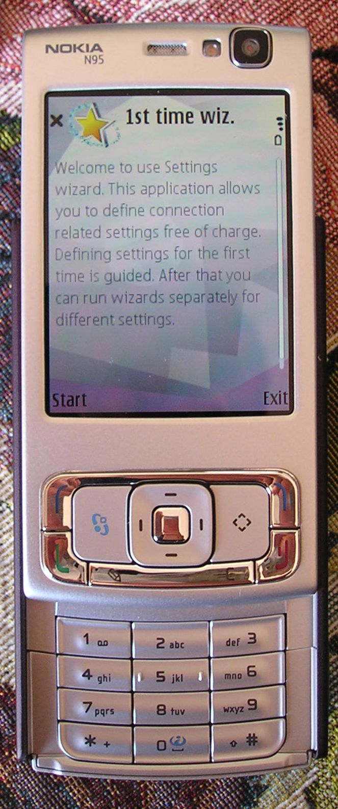 Nokia N95 Unpacking